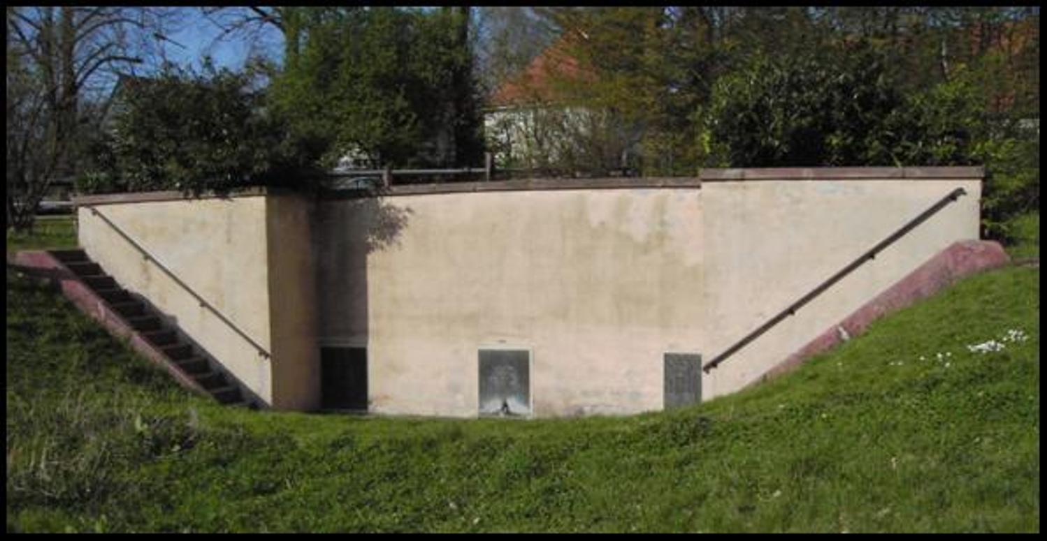 Dreibrunnenquelle Darmstadt 2005